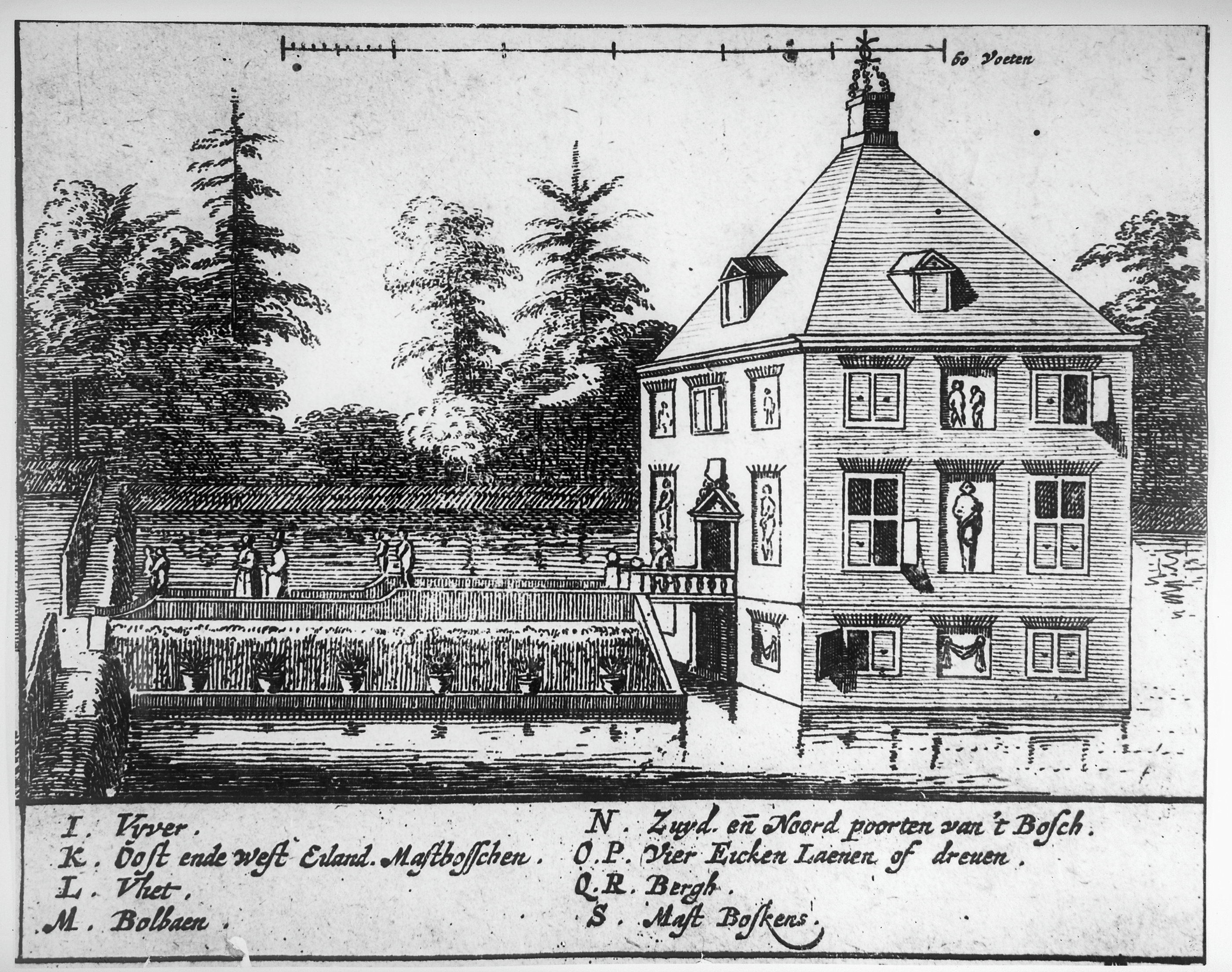 Huis Hofwijck: naar prent in het Gemeente archief 's-Gravenhage